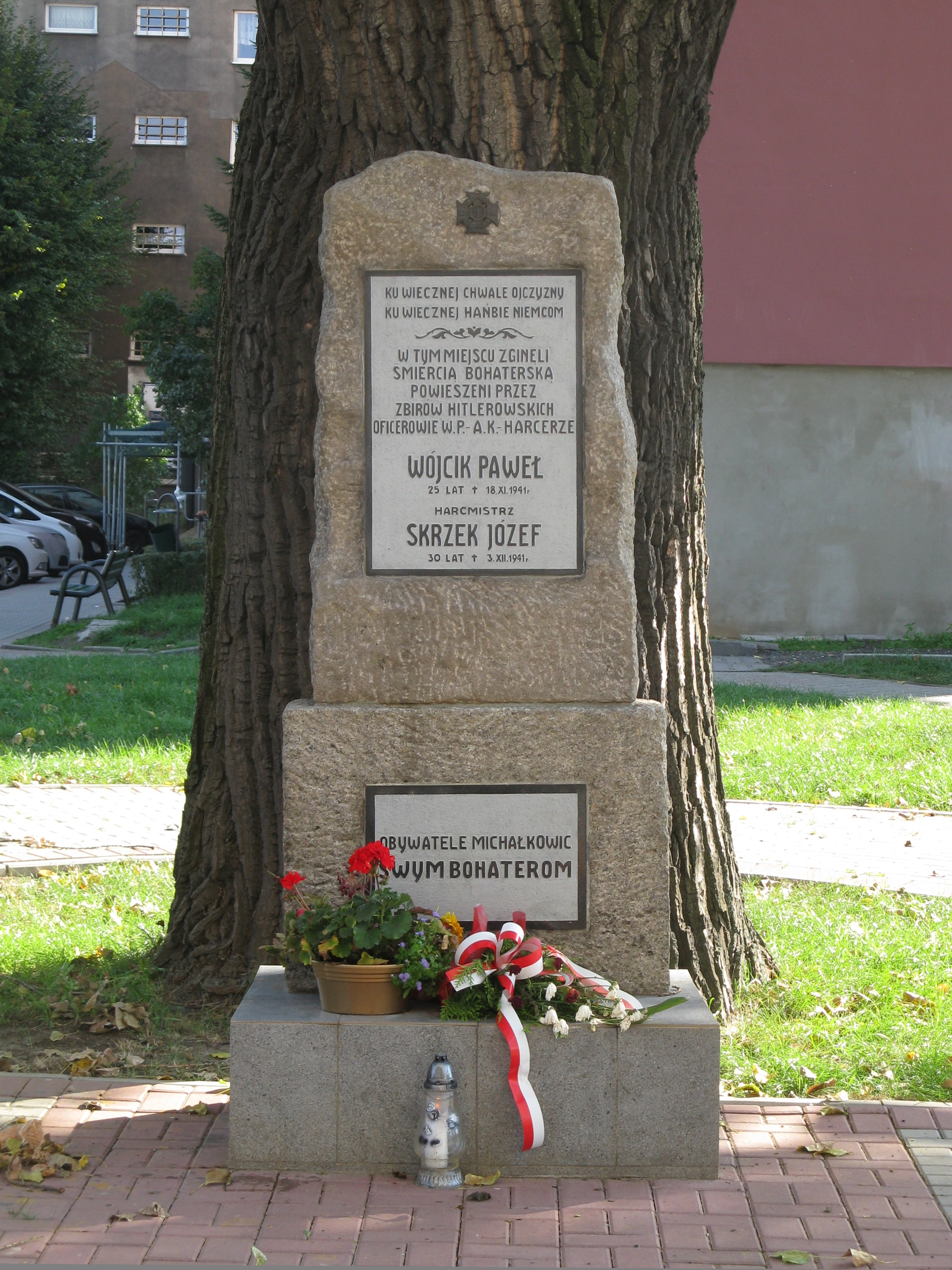 Pomnik upamiętniający śmierć harcerzy i działaczy niepodległościowych: Pawła Wójcika (1916–1941) i Józefa Skrzeka (1911–1941) znajdujący się na placu Skrzeka i Wójcika w Siemianowicach Śląskich-Bytkowie, pod topolą, na której zostali oni powieszeni.